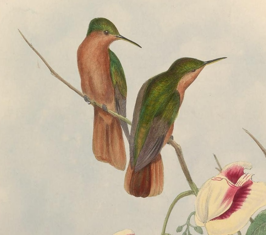 Campylopterus hyperythrus. Ilustración en A monograph of the Trochilidæ, or family of humming-birds de John Gould.